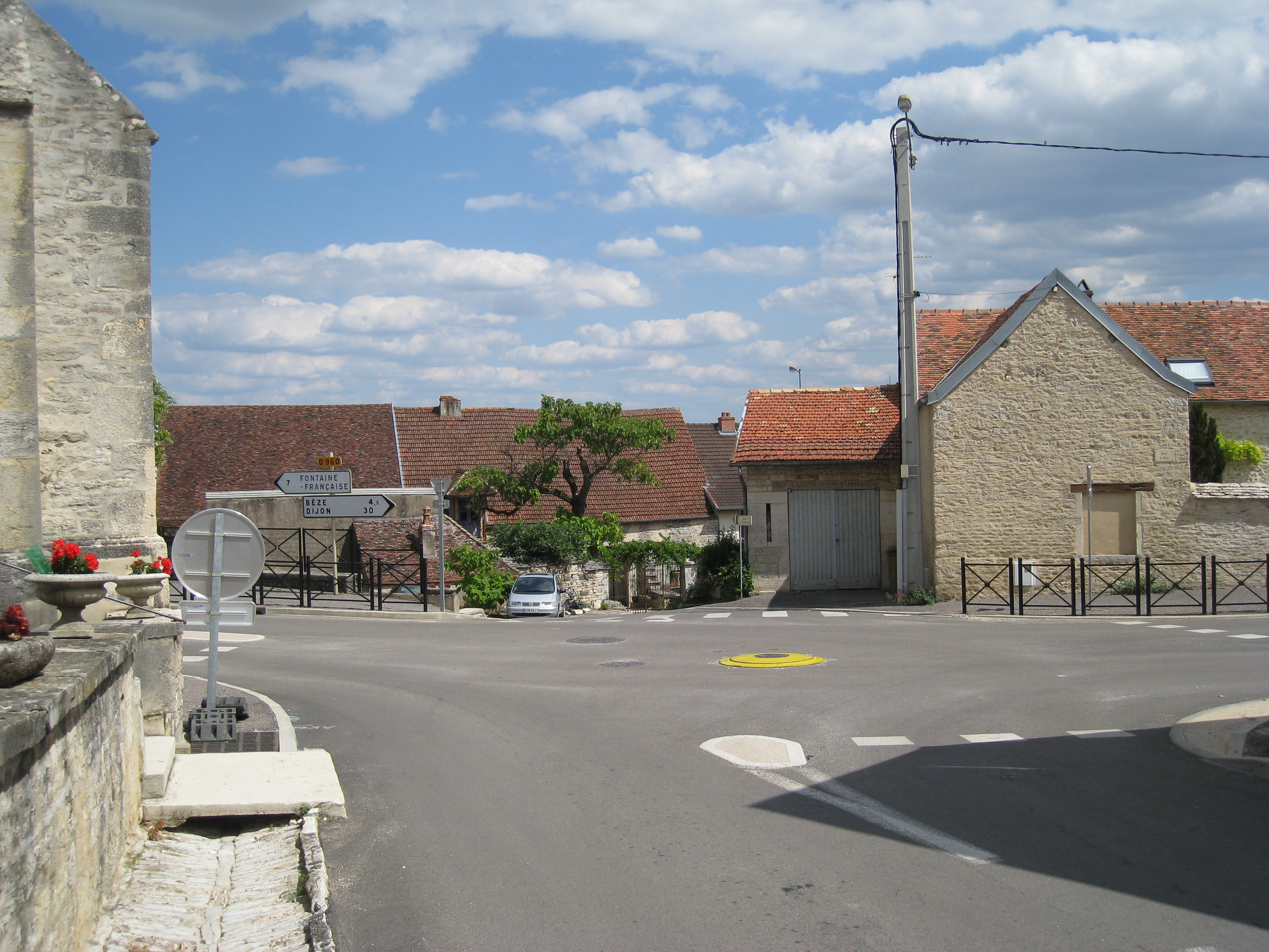 Vue de Bourberain depuis la place devant l'église